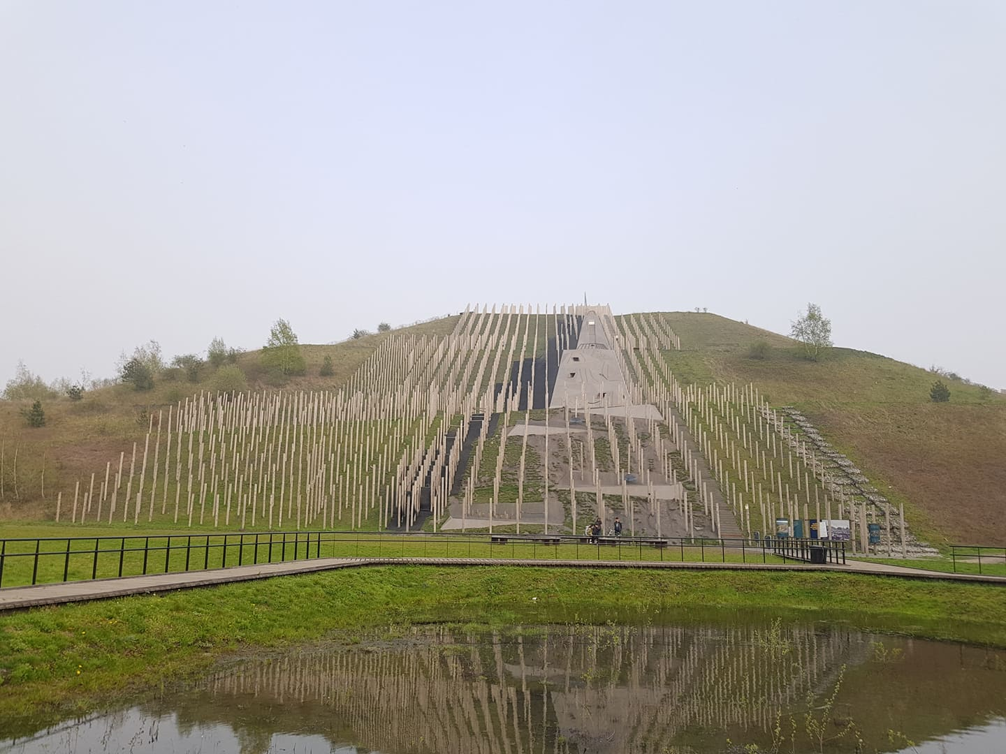 De Avonturenberg op de kleine terril van Beringen.